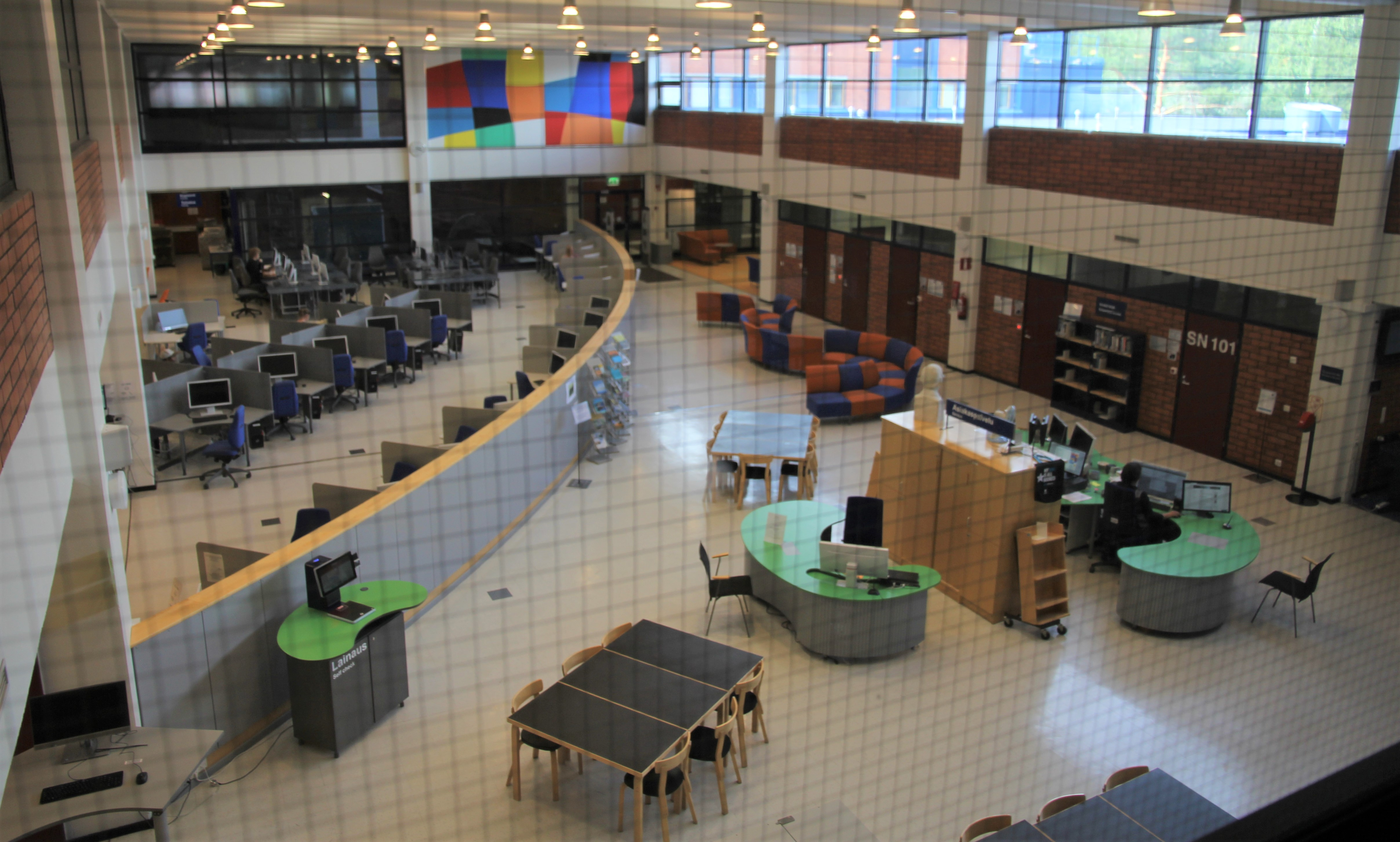 Näkymä Itä-Suomen yliopiston kirjaston Kuopion kampuskirjastoon Snellmaniassa (Yliopistonranta 1 E) Kuopion Savilahden kaupunginosassa.